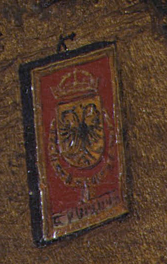 Aushängeschild mit dem Habsburger Doppeladler. Ausschnitt aus dem Gemälde Die Volkszählung zu Bethlehem